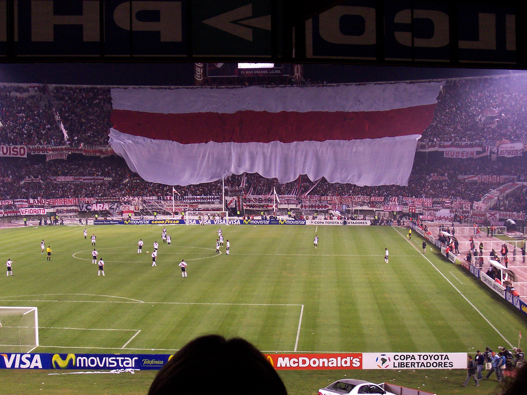 Partido de River contra Libertad de Paraguay por 4º de final de copa libertadores.